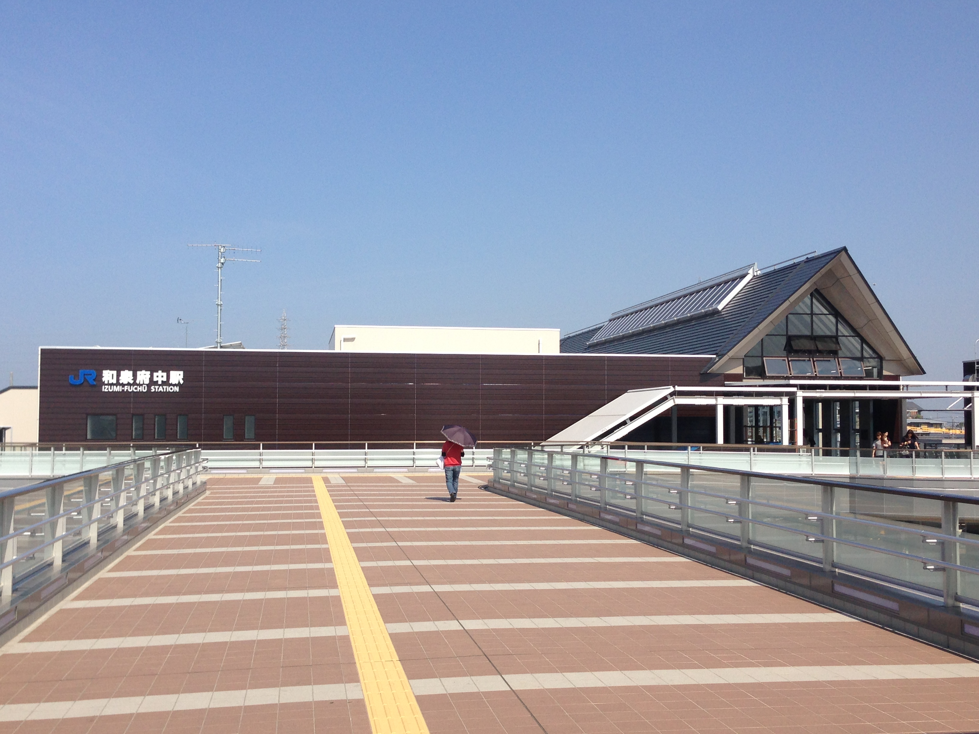 和泉府中駅東側より撮影